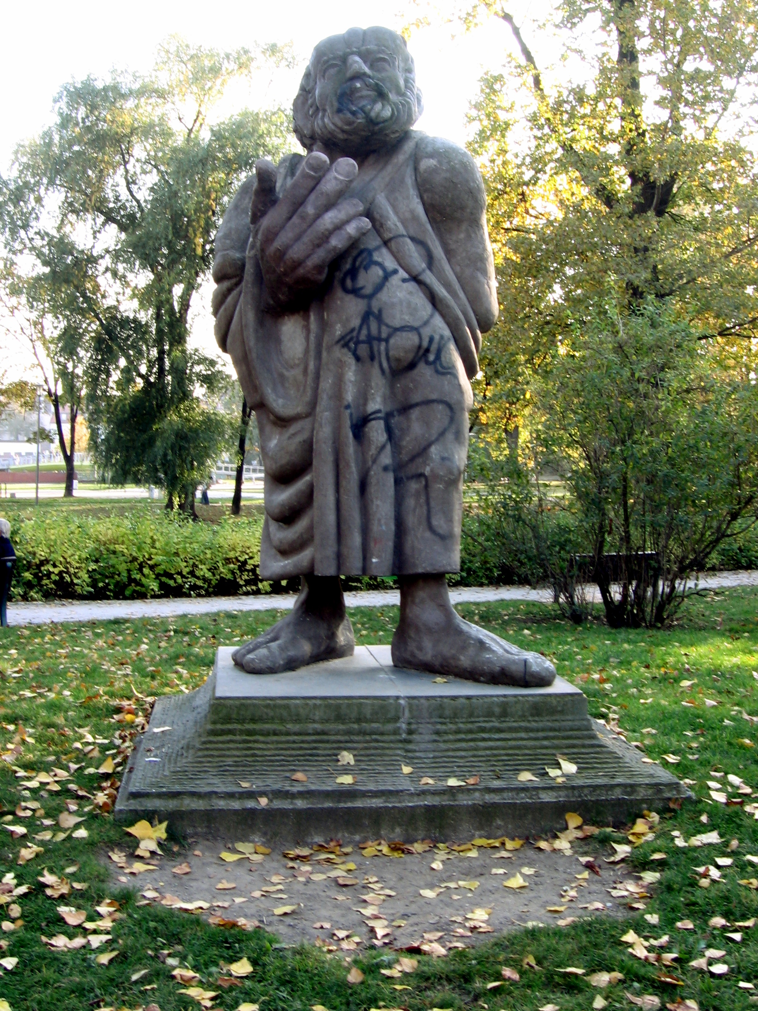 "Sokrates" - dar rzeźbiarza Stanisława Netswoldowa dla miasta Wrocławia, rzeźba ustawiona w 1993 na Wyspie Bielarskiej